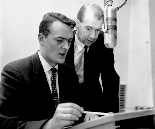 Erik Bye go Otto Nilsen i studio 13. mars 1958, under opptak av programmet "Kort sagt".